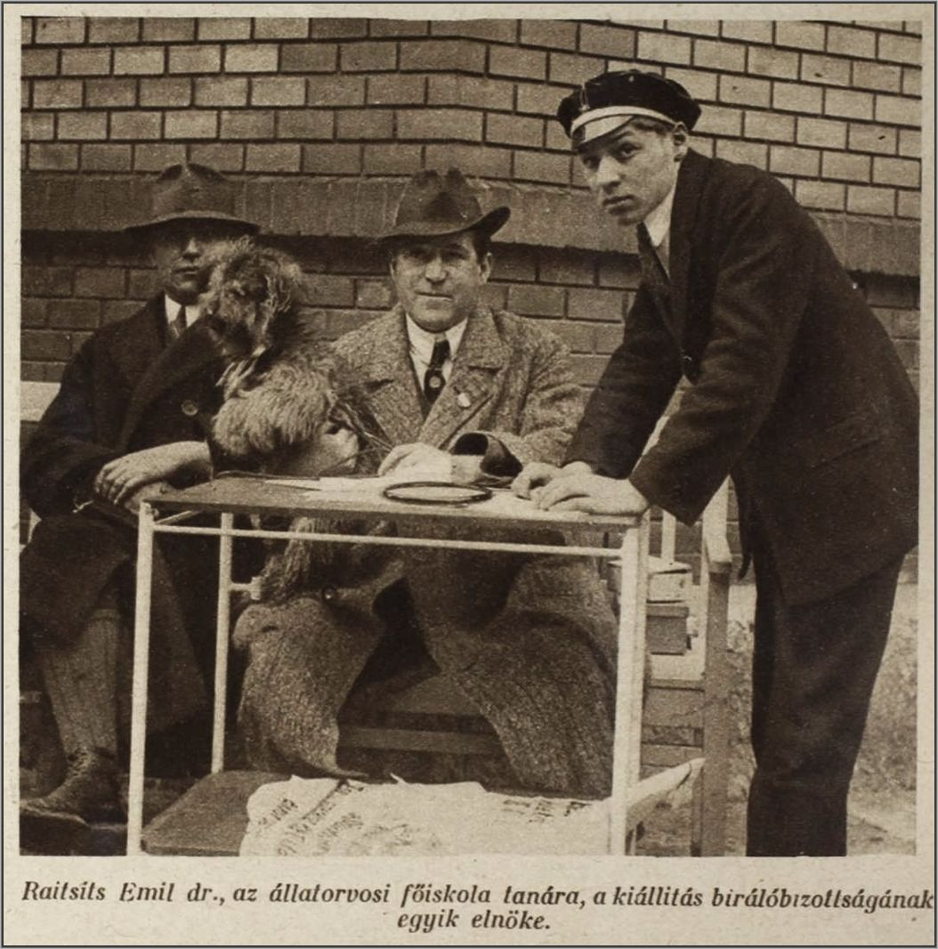 Raitsits Emil (Budapest, 1882. március 8. – Budapest, 1934. március 24.) állatorvos, a belgyógyászati diagnosztika tanára, kinológus az 1925-ben tartott ebkiállítás bíráló bizottságában